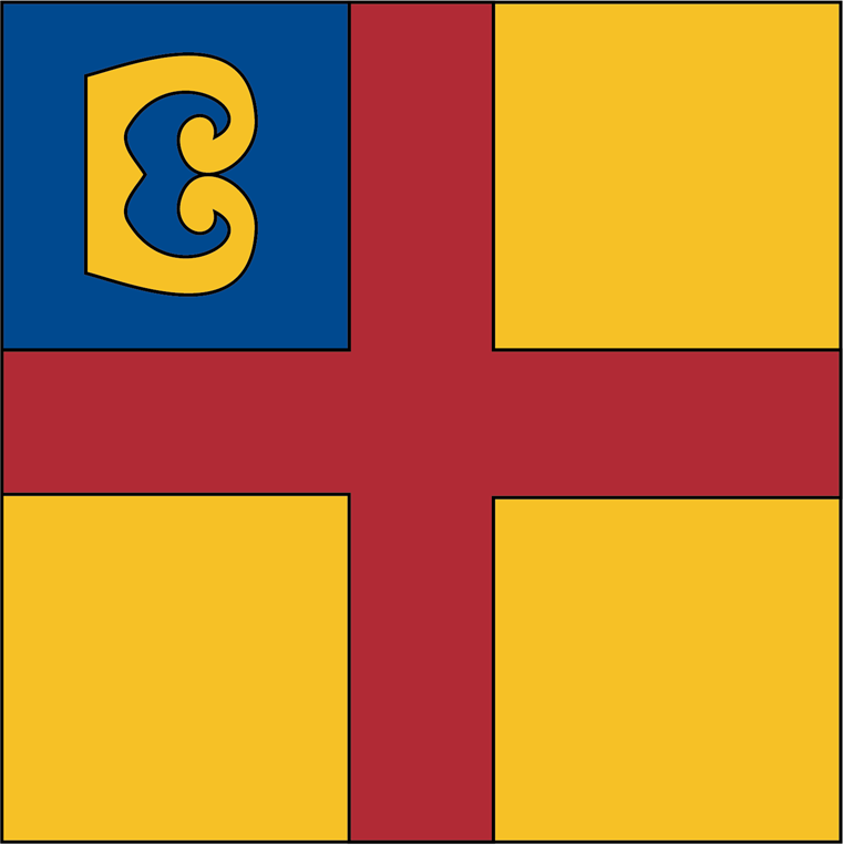 Застава Врања, аутор Немања Тодоровић Штиплија, Dalibor Stojković i Nikola Salatić.